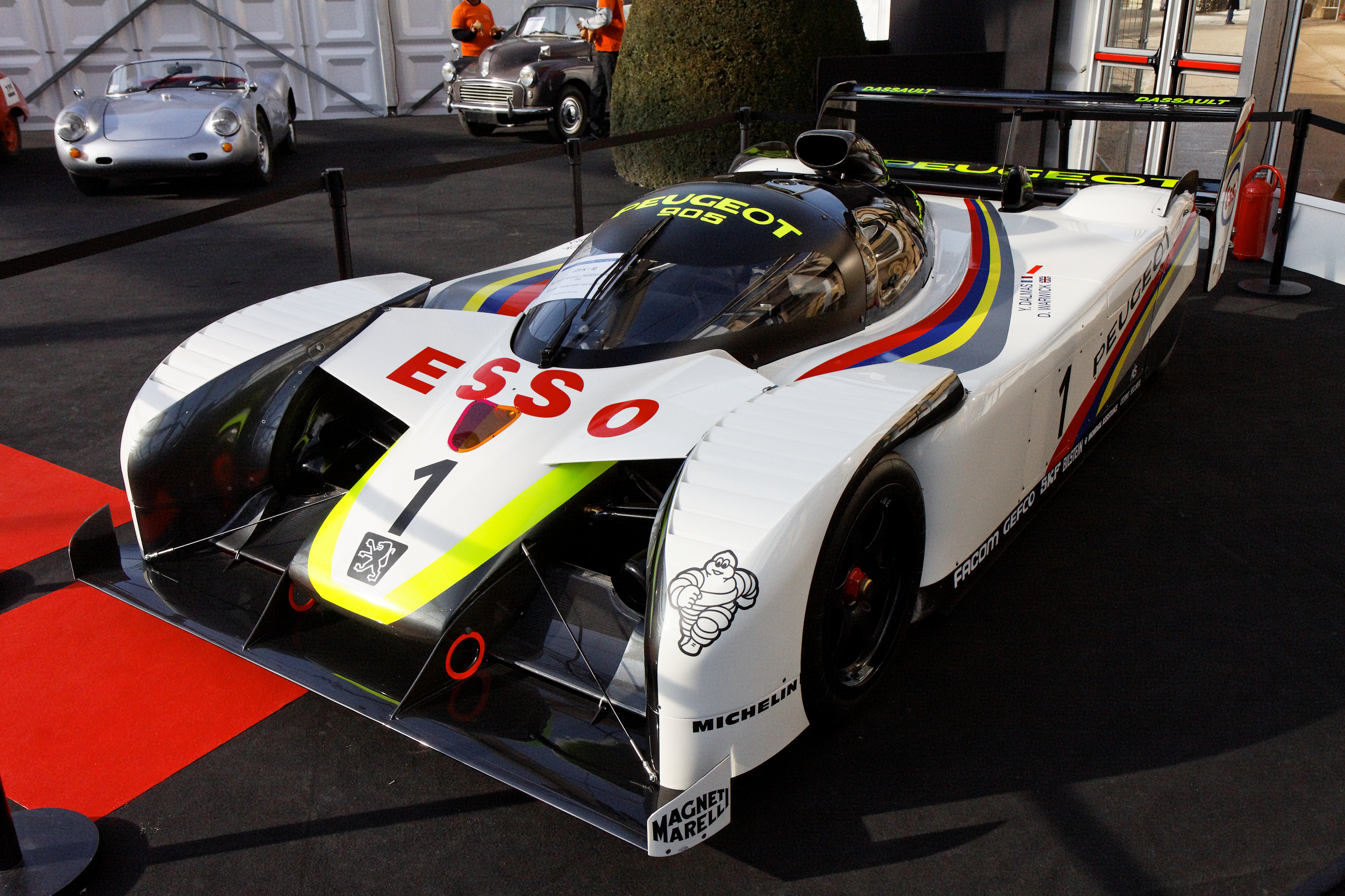 Peugeot 905 - Festival Automobile International 2011 - Vente aux enchères